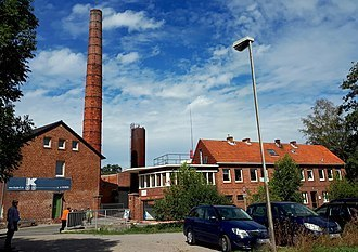 Stockheider Mühle; Strüver Weg 112-118 in der Aachener Soers; Baudenkmal in Aachen-Laurensberg; Sitz des Tuchwerk Aachens, des Theater K und des Atelier Pasch